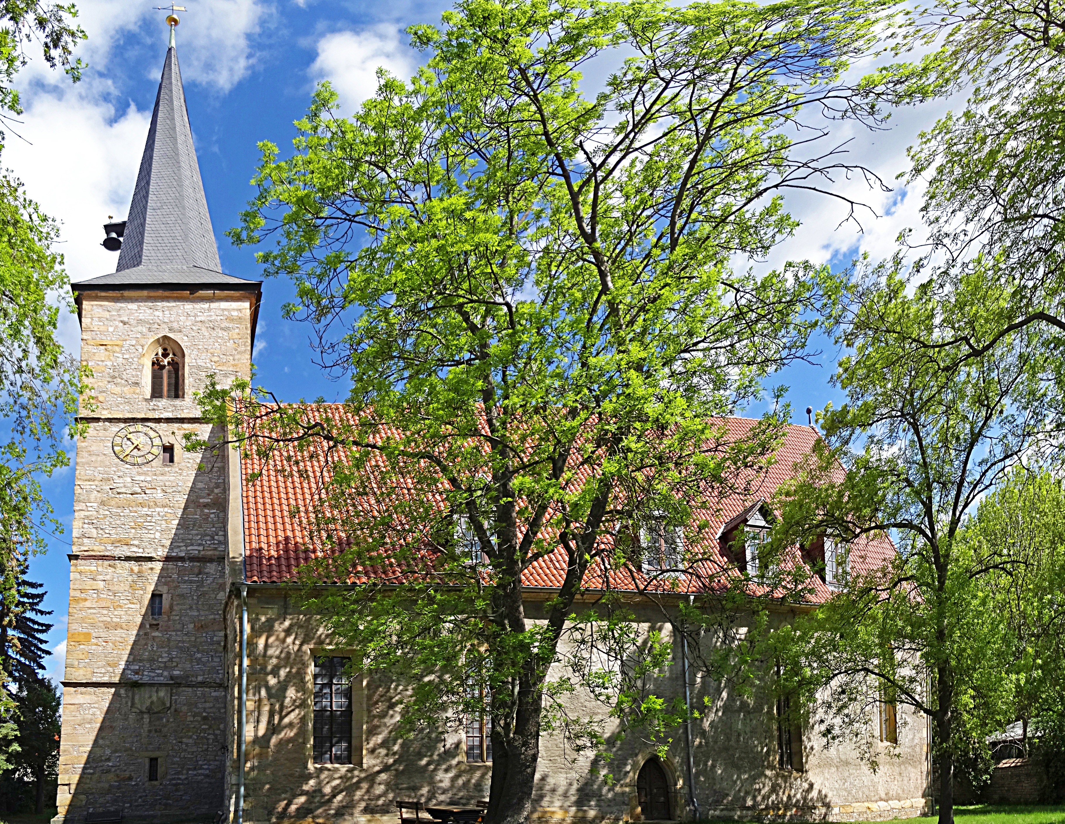 Dorfkirche St. Michaelis (Elxleben an der Gera) von Süden